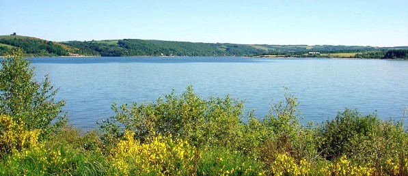 Lac de Pareloup